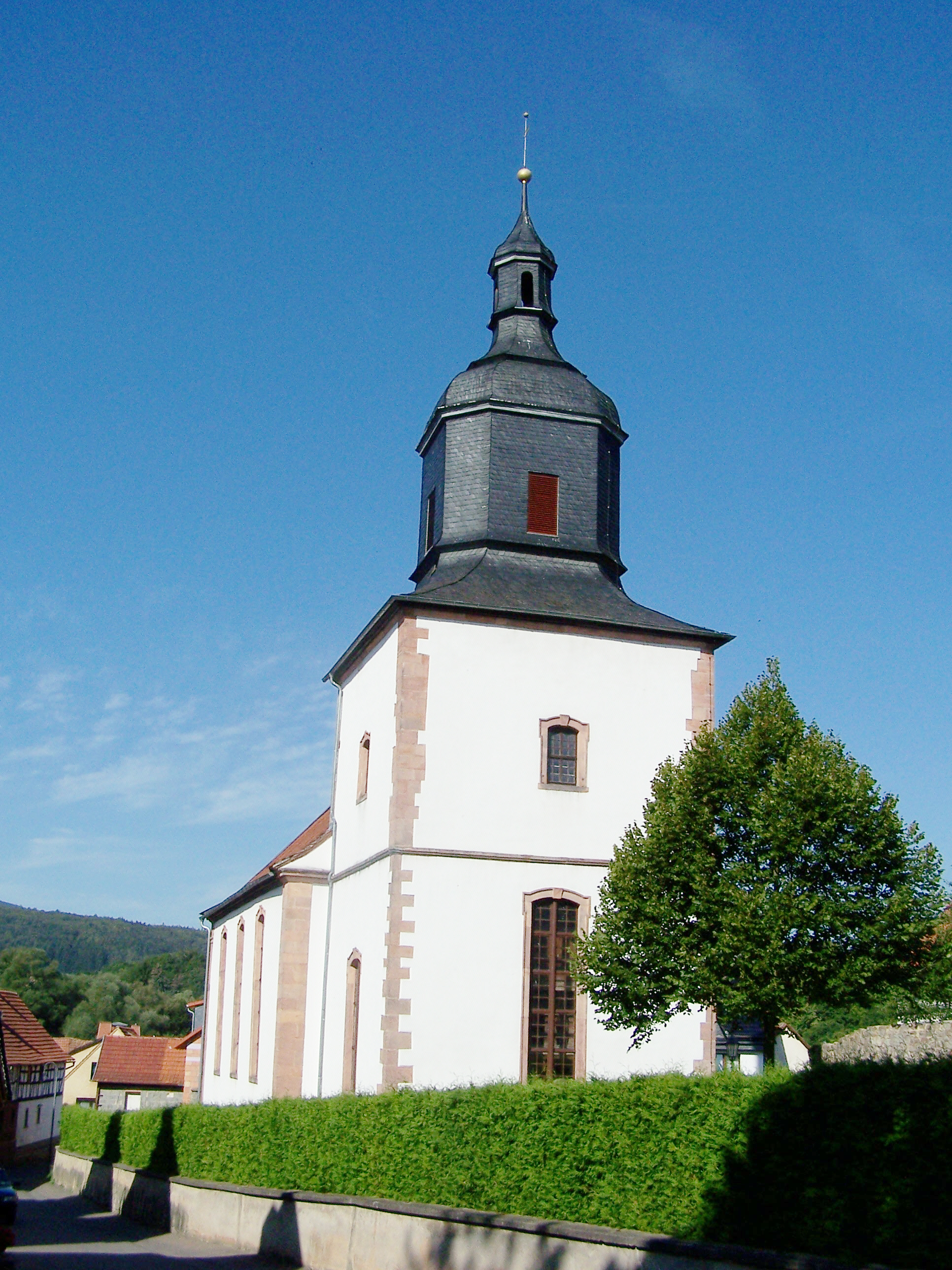 Die Kirche in Weilar - Gesamtansicht.